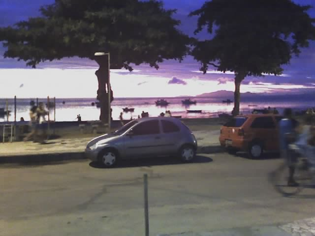 Foto do por do sol na práia de Sepetiba